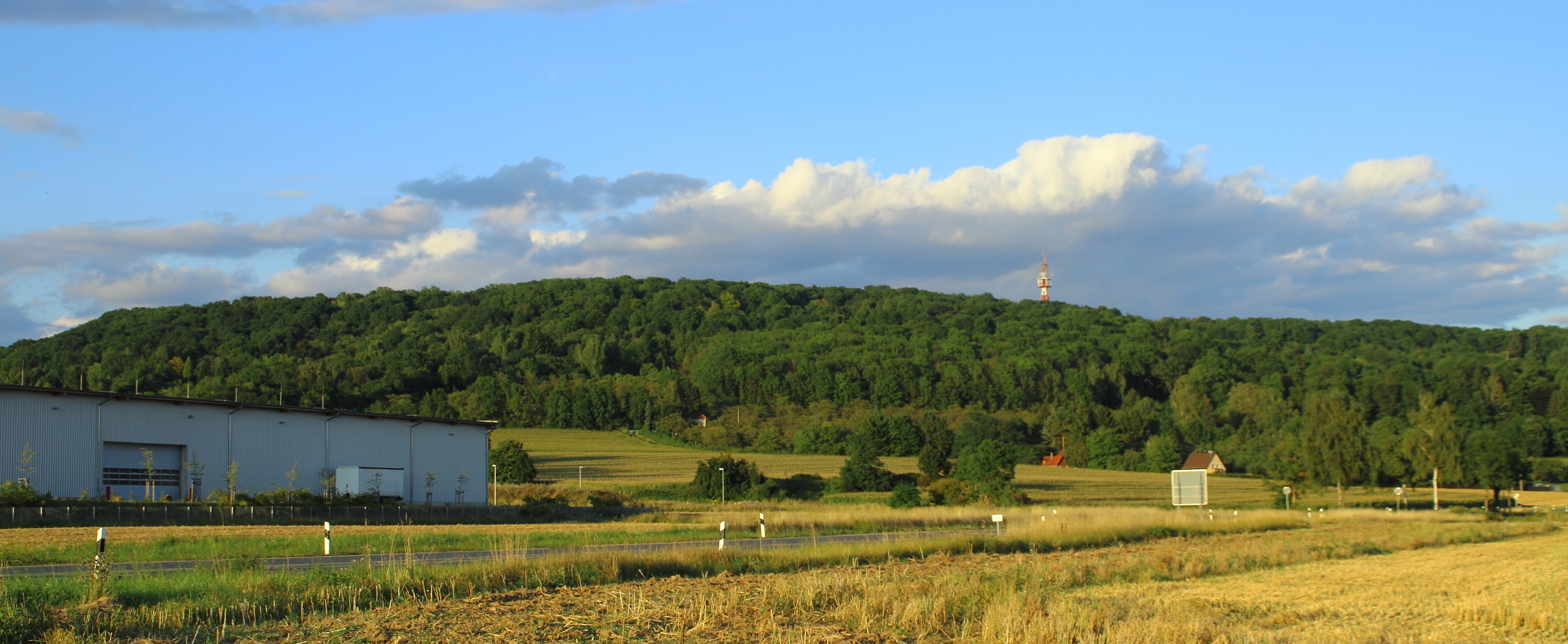 Oschenberg bei Bayreuth